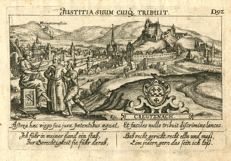 aus Daniel Meisner's Schatzkästlein “Creutznach. [-] Rheingravenstein.” Kupferstich aus Daniel Meisner’s Schatzkästlein. Ausgabe bei Paul Fürst, unter dem Titel : “Sciographia Cosmica”, 1638 ff.